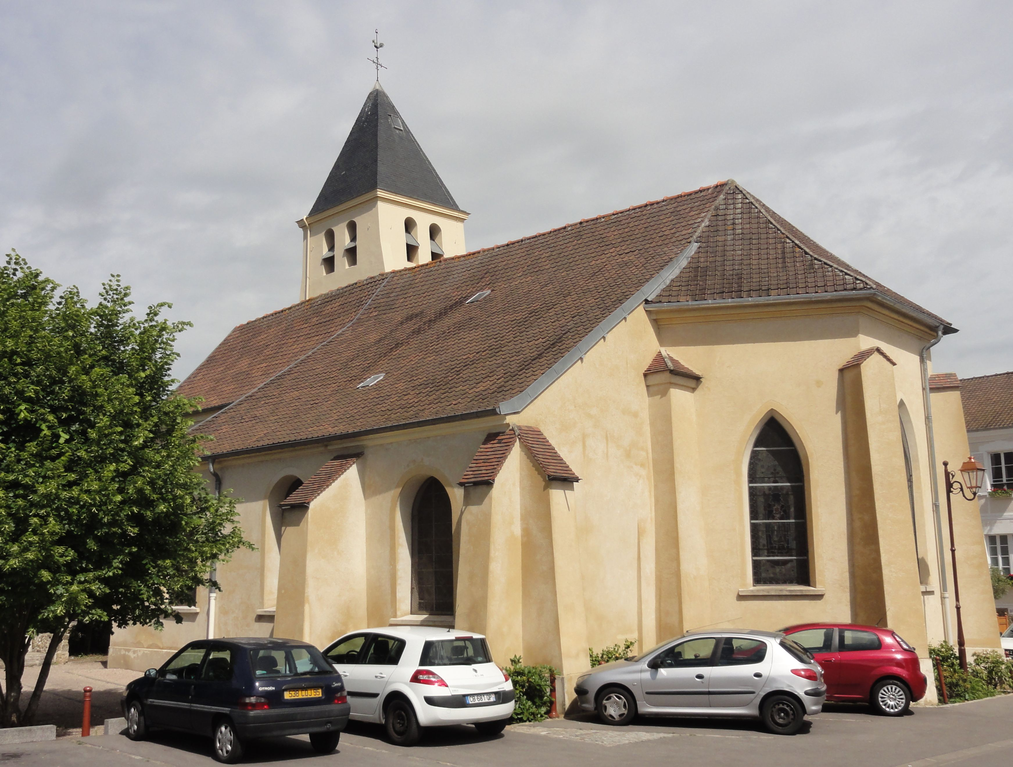 Église Saint-Maclou de Moisselles.